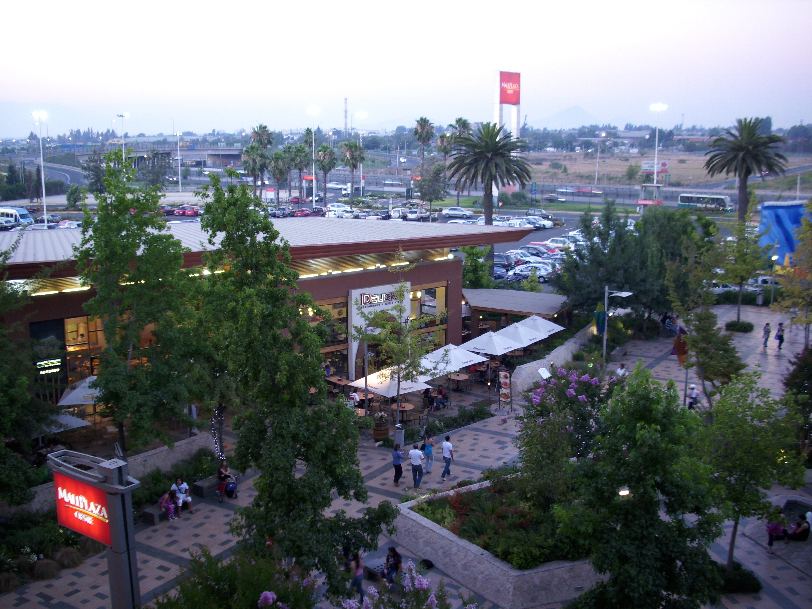 El sector de «Las Terrazas» del centro comercial Plaza Oeste, en la comuna de Cerrilos. Santiago de Chile.